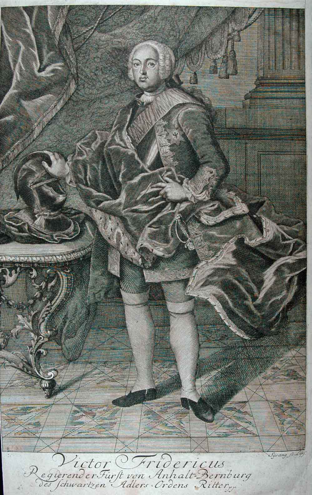 1 grafiskt blad, kopparstick; 28 x 19 cm Kopparstick ur okänt bokverk föreställande fursten Viktor Fredrik av Anhalt Bernburg. Illustratör: Sysang